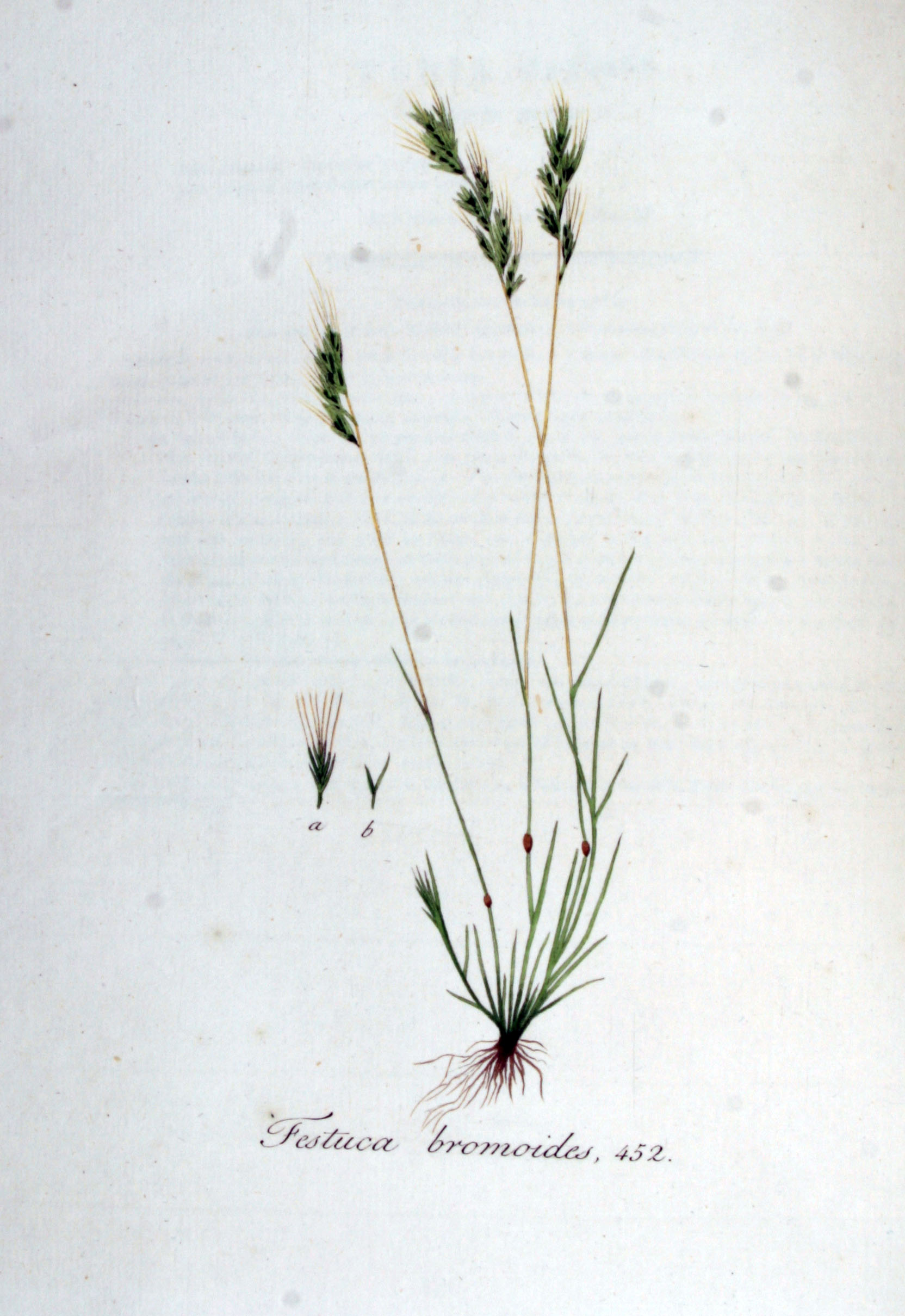 Vulpia bromoides (L.) S.F. Gray (Syn. Festuca bromoides L.)